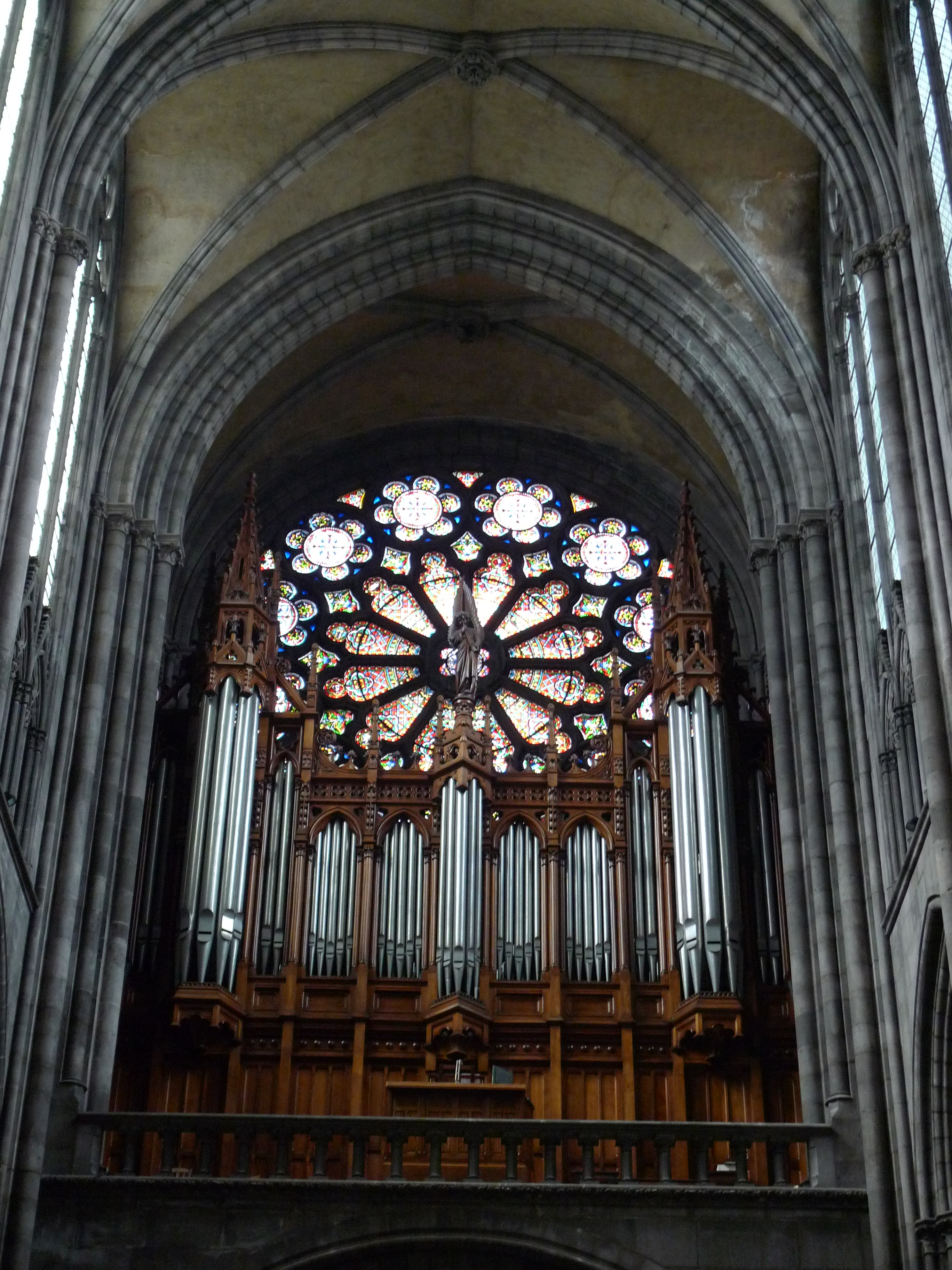 cathédrale Notre-Dame-de-l'Assomption (CLERMONT-FERRAND,FR63)